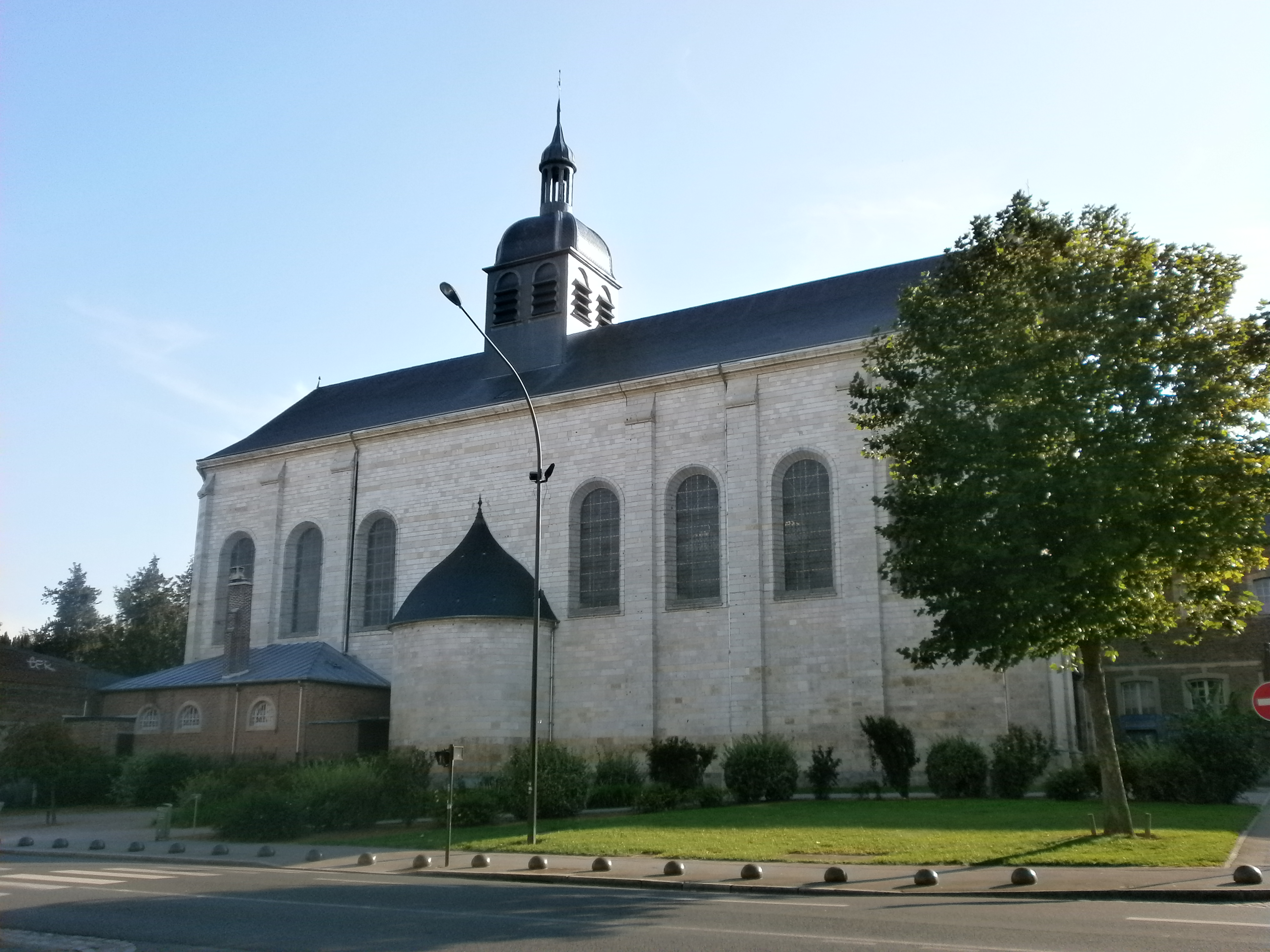 Amiens - Eglise Saint-Acheul .